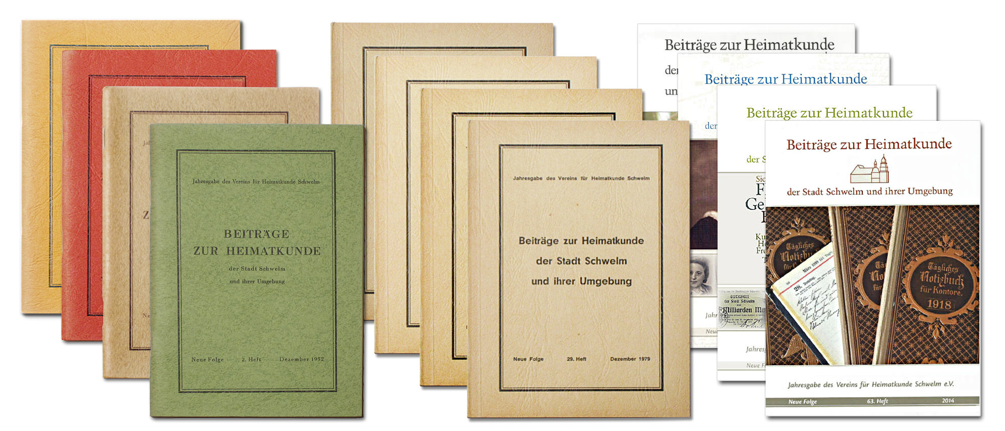 Einige Jahreshefte des Vereins für Heimatkunde Schwelm, etwa aus der Zeit zwischen 1951 und 2014 (frühere Hefte links, spätere rechts). Format und Umschlaggestaltung variierten über die Zeit geringfügig.